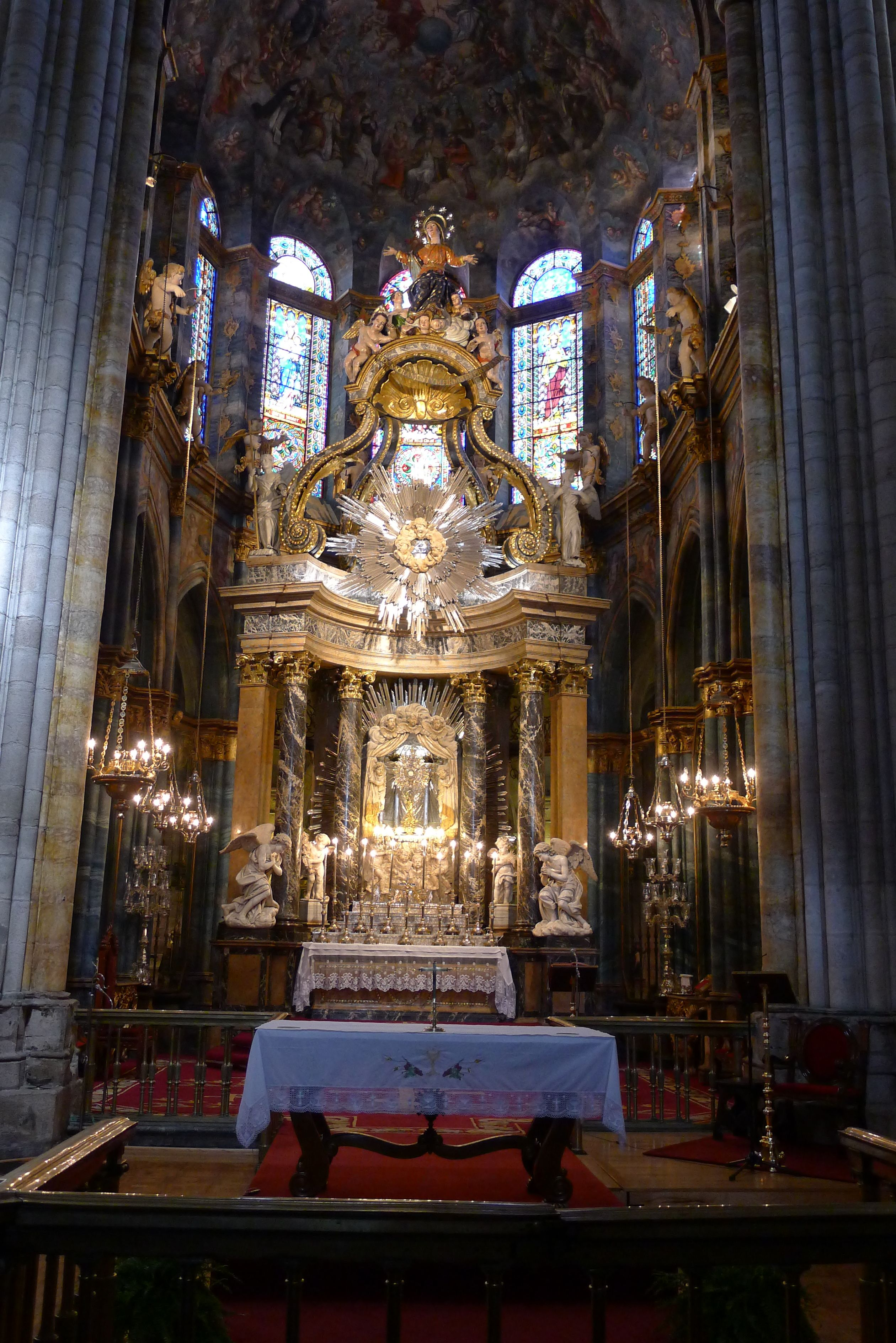 Catedral de Lugo - Galicia